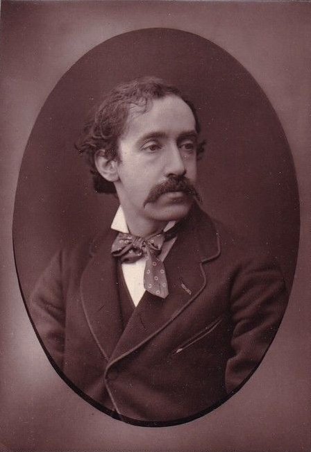 Portrait d'Henri-Léopold Lévy (1840-1904) par Nadar. 11,5 x 8 cm.